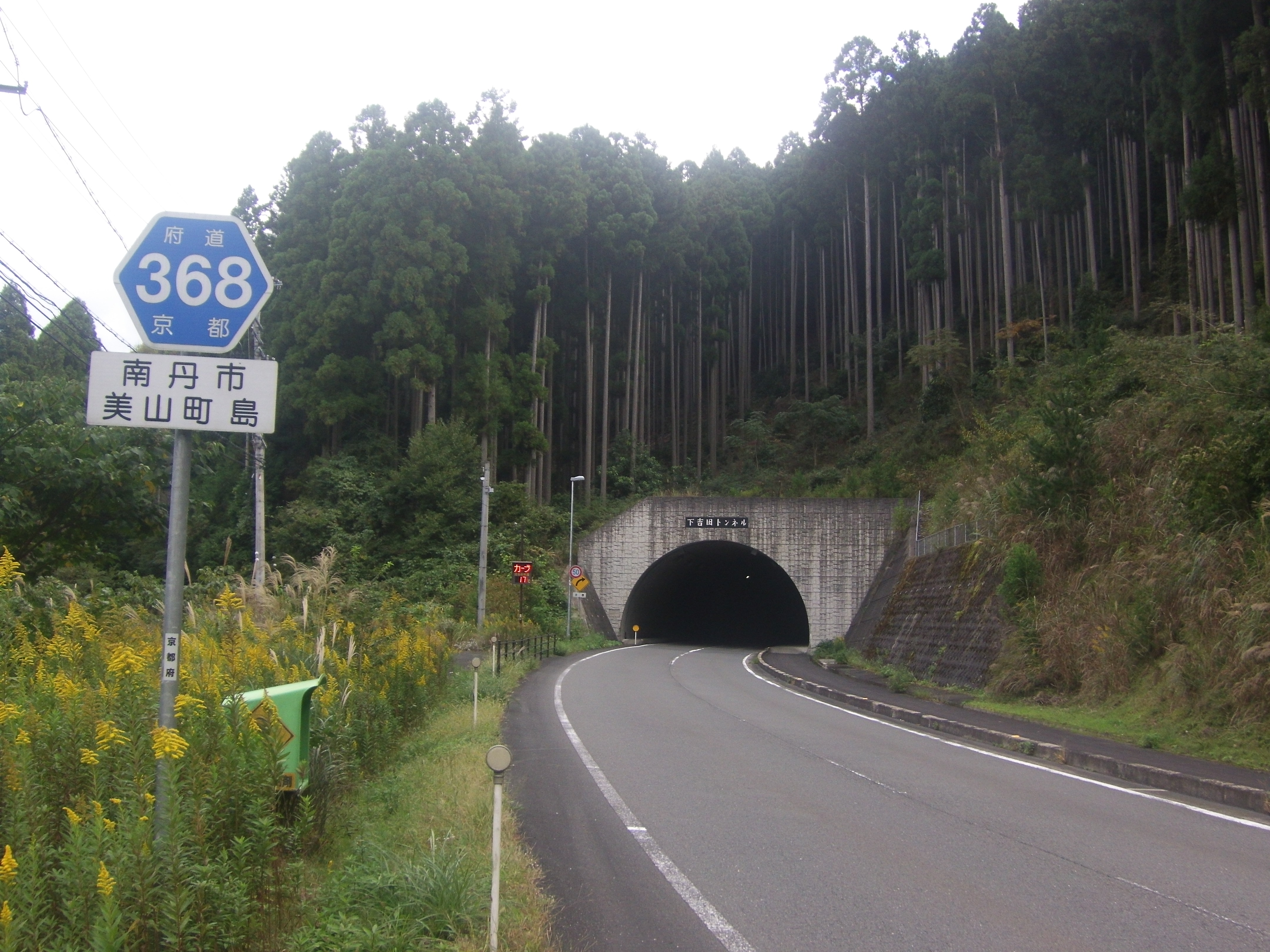 南丹市美山町を走る京都府道368号線・下吉田トンネル